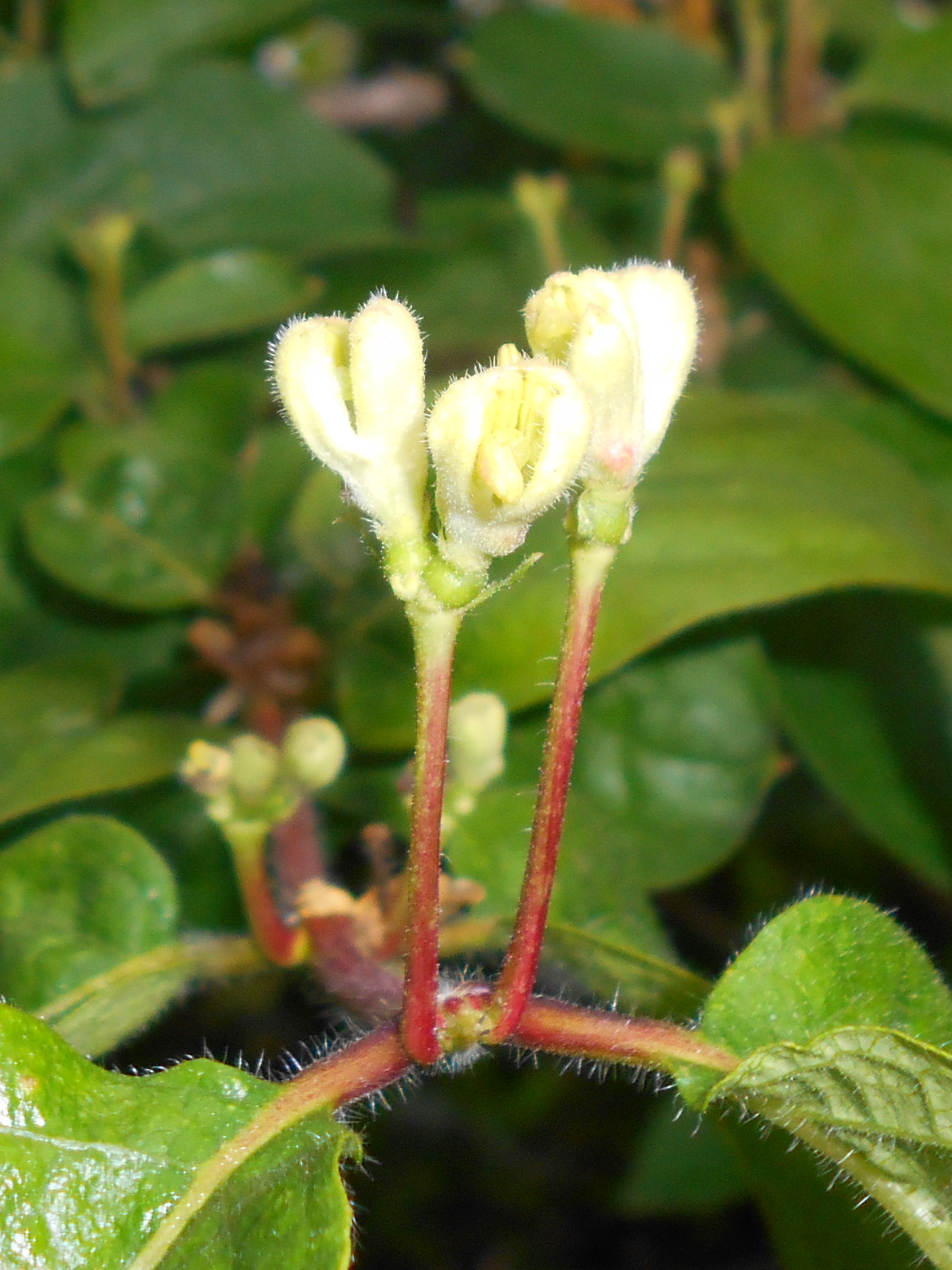 Lonicera chrysantha, Ogród Botaniczny Uniwersytetu Warszawskiego.